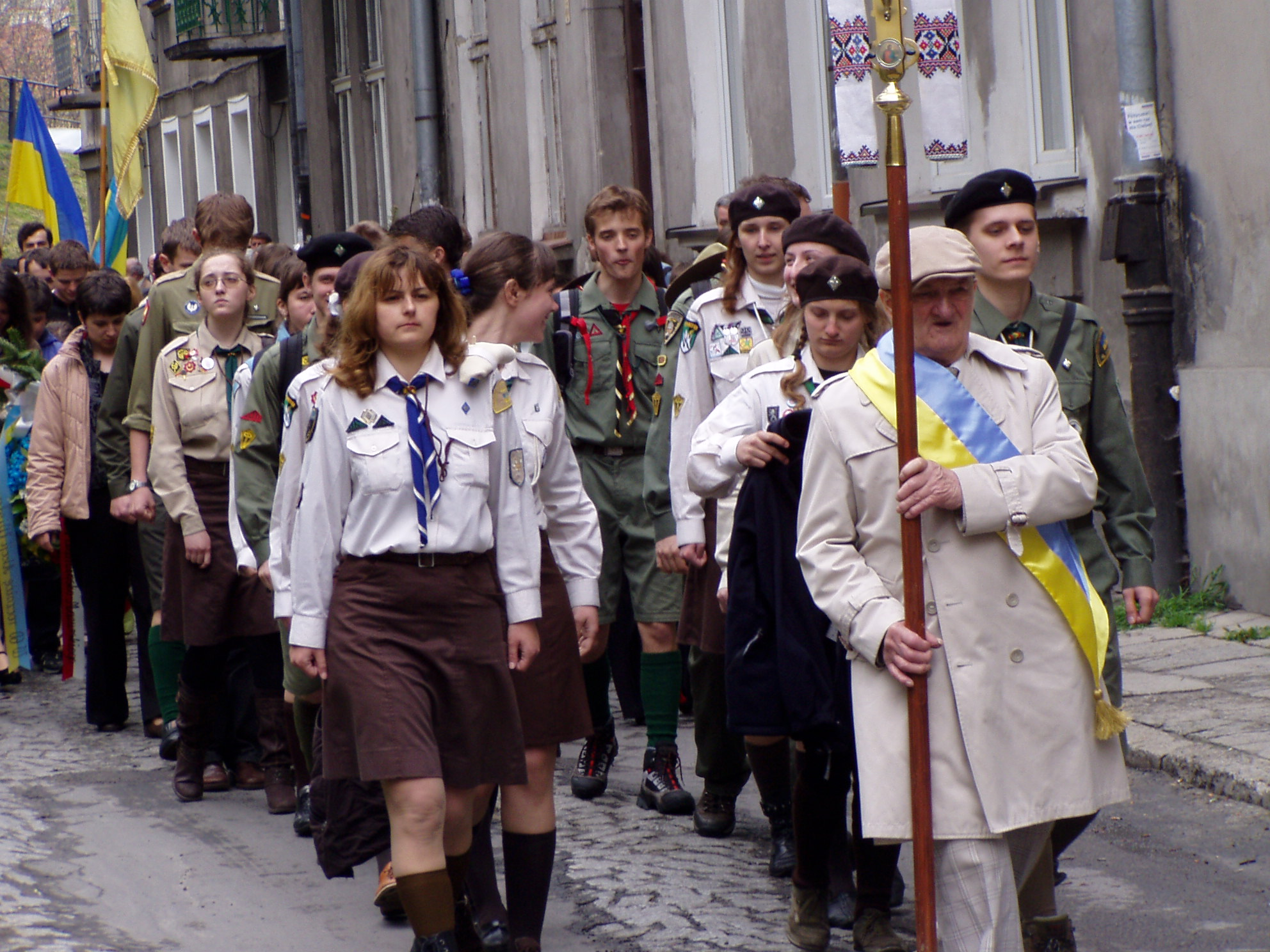 Marsz pamięci Akcji Wisła.